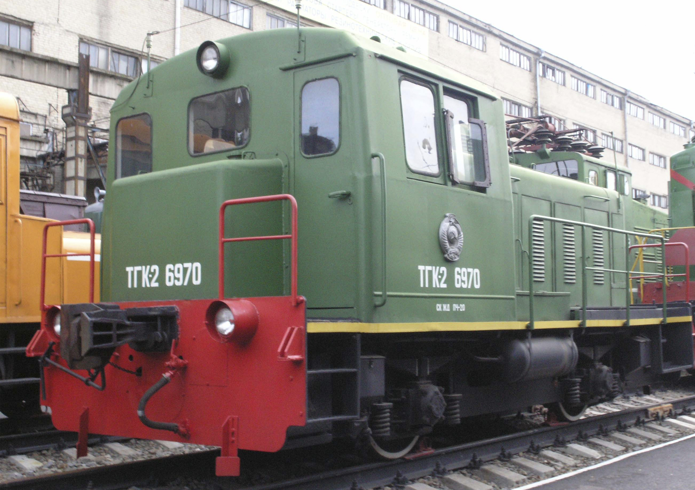 Паровоз построен в 1977 году Калужским машиностроительным заводом